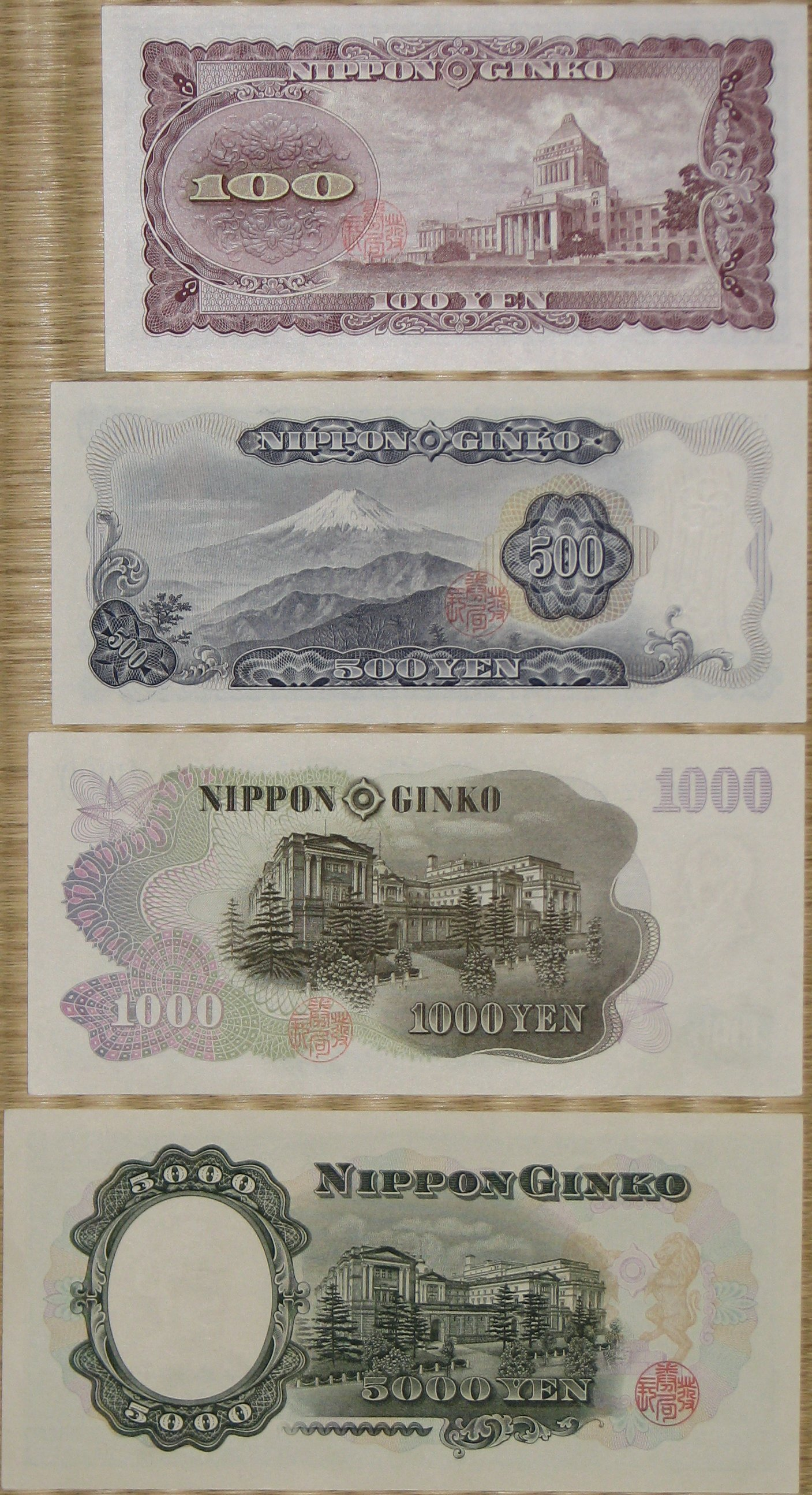 Photo des anciens billets de 100, 500, 1000 et 5000 yens (verso)